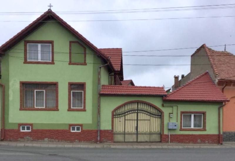 Casă, oraș Săliște, Piața Eroilor 2, 1885